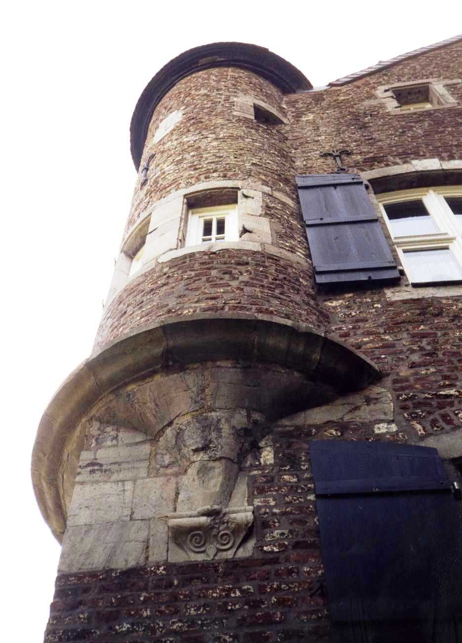 Eckturm des Broicher Hofs in Eschweiler-Dürwiß